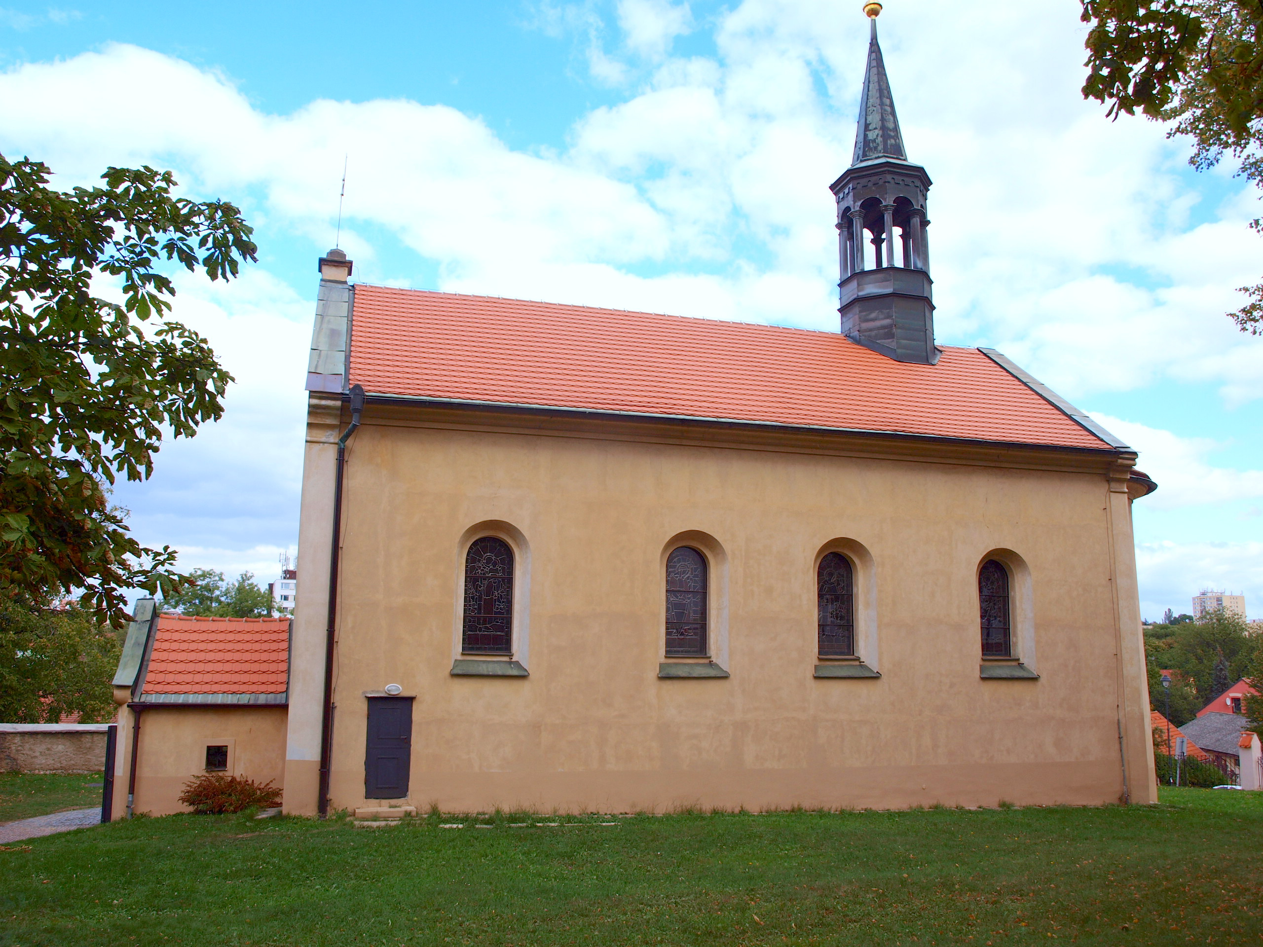 Hostivařský kostel